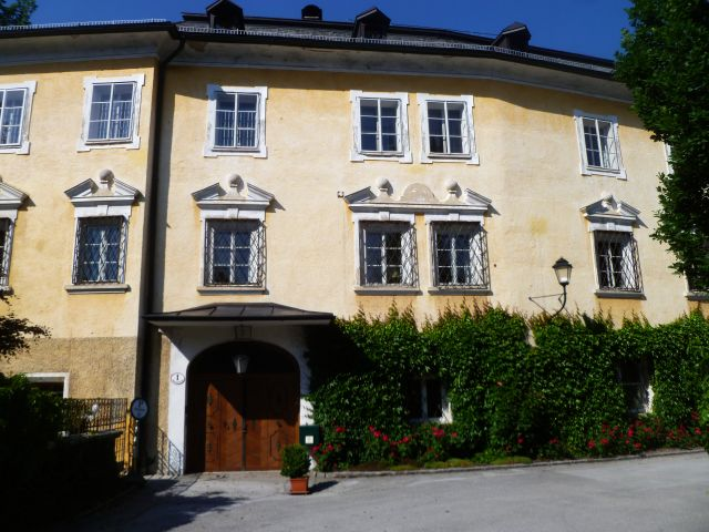 Ansitz, Der Hof Blumenstein zu Münchshausen